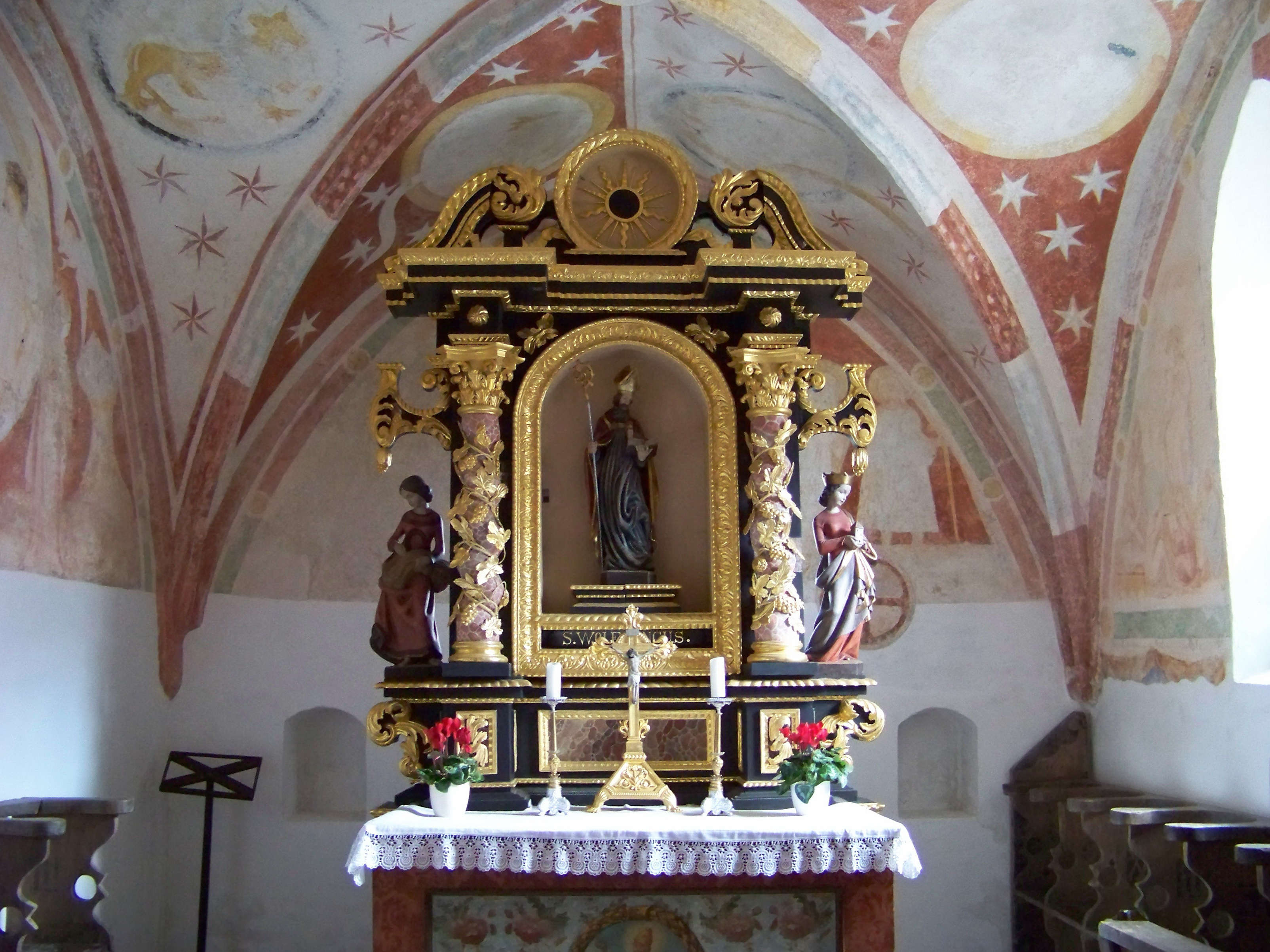 Essenbach, St. Wolfgang 2. Kirche St. Wolfgang. Saalkirche mit eingezogenem quadratischem Chor und Westturm, frühgotische Anlage um 1300, Backsteinbau, Turmuntergeschoss wohl spätes 15. Jahrhundert, Turmaufbau 1689, Gliederung am Turm durch Geschossteilung und Blendbögen, mit Kupppelhaube; mit Ausstattung; Kirchhofmauer, wohl 17./18. Jahrhundert. Altar St. Wolfgang. Seitenfiguren St. Notburga u. St. Barbara.